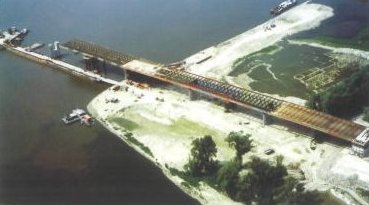 Budapest. A Deák Ferenc híd ártéri acélszerkezete